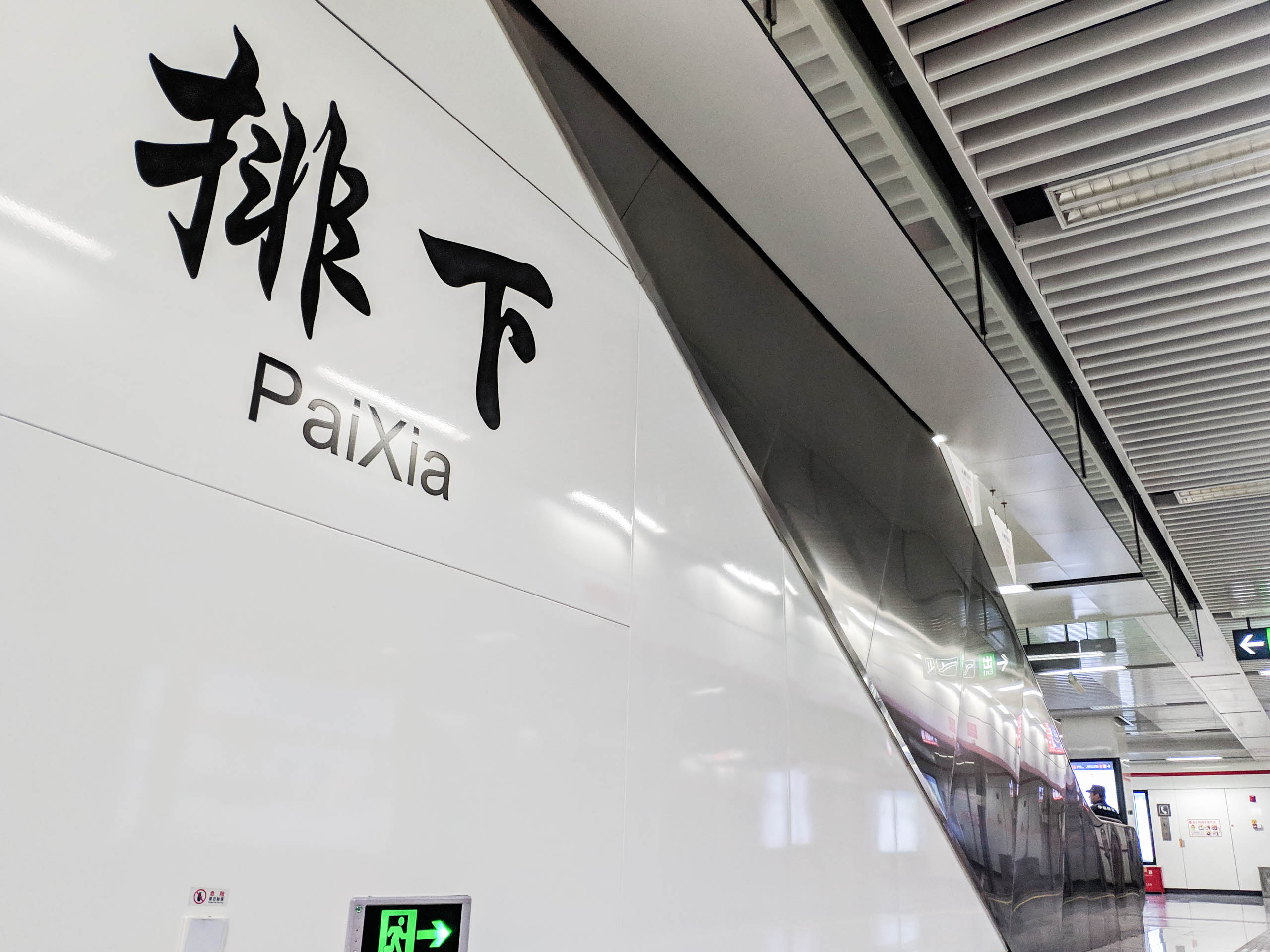 中文（中国大陆）: 福州地铁1号线排下站